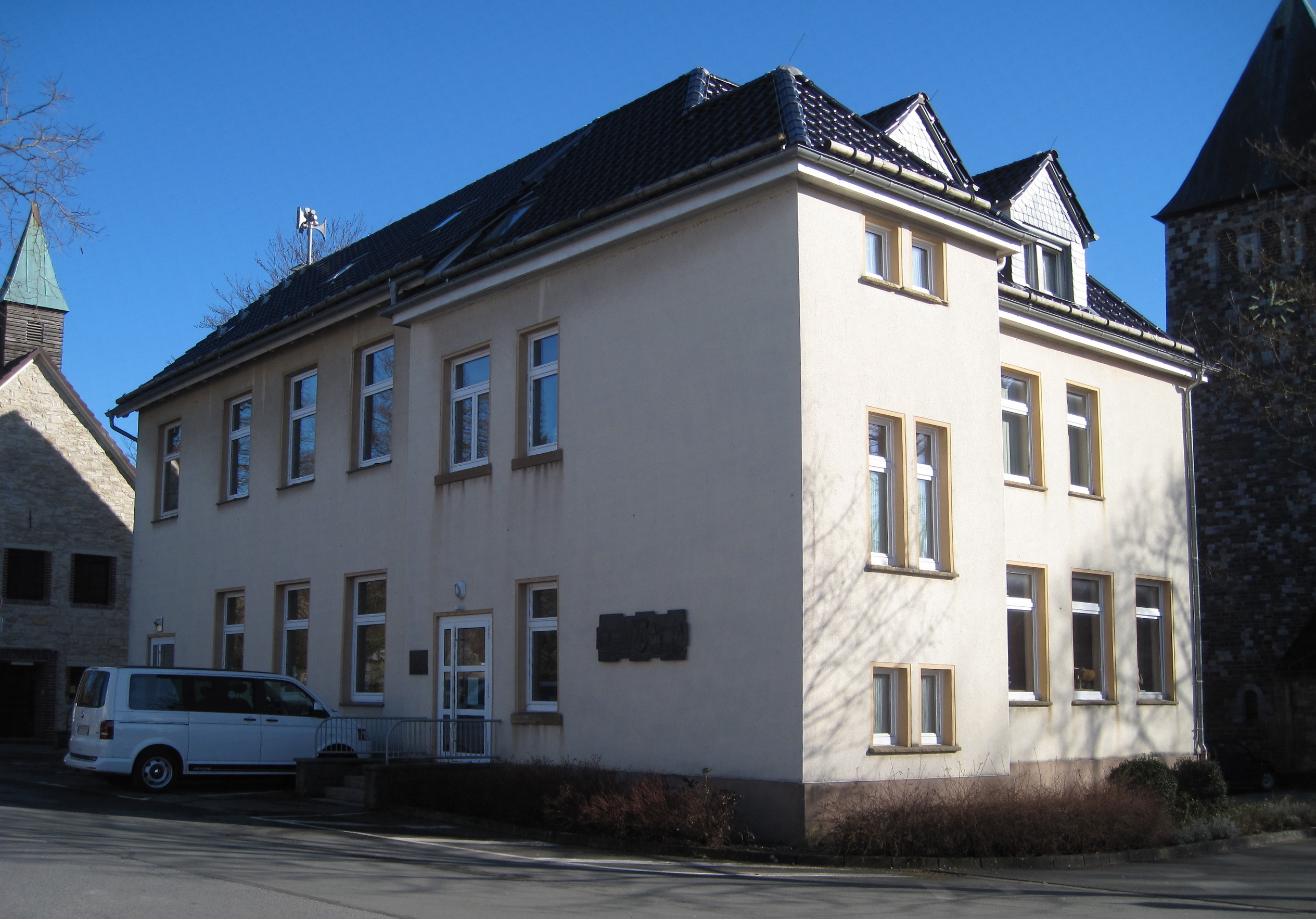 Heimatmuseum (Heimatarchiv Ense - Niederense Himmelpforten, Verein für Geschichte und Heimatpflege e. V.) in Ense-Niederense.